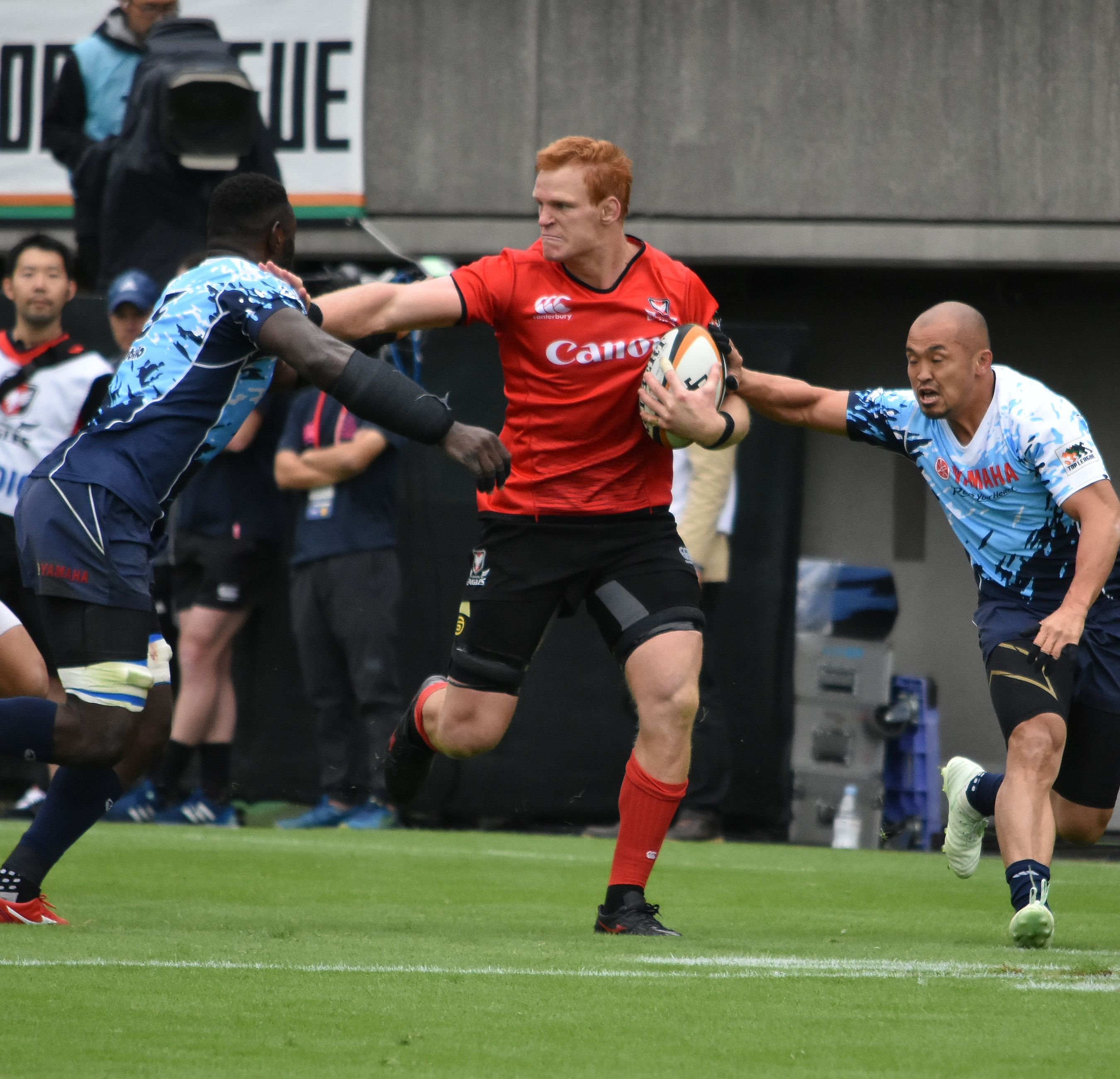 フィリップ・ヴァン・ダー・ウォルト